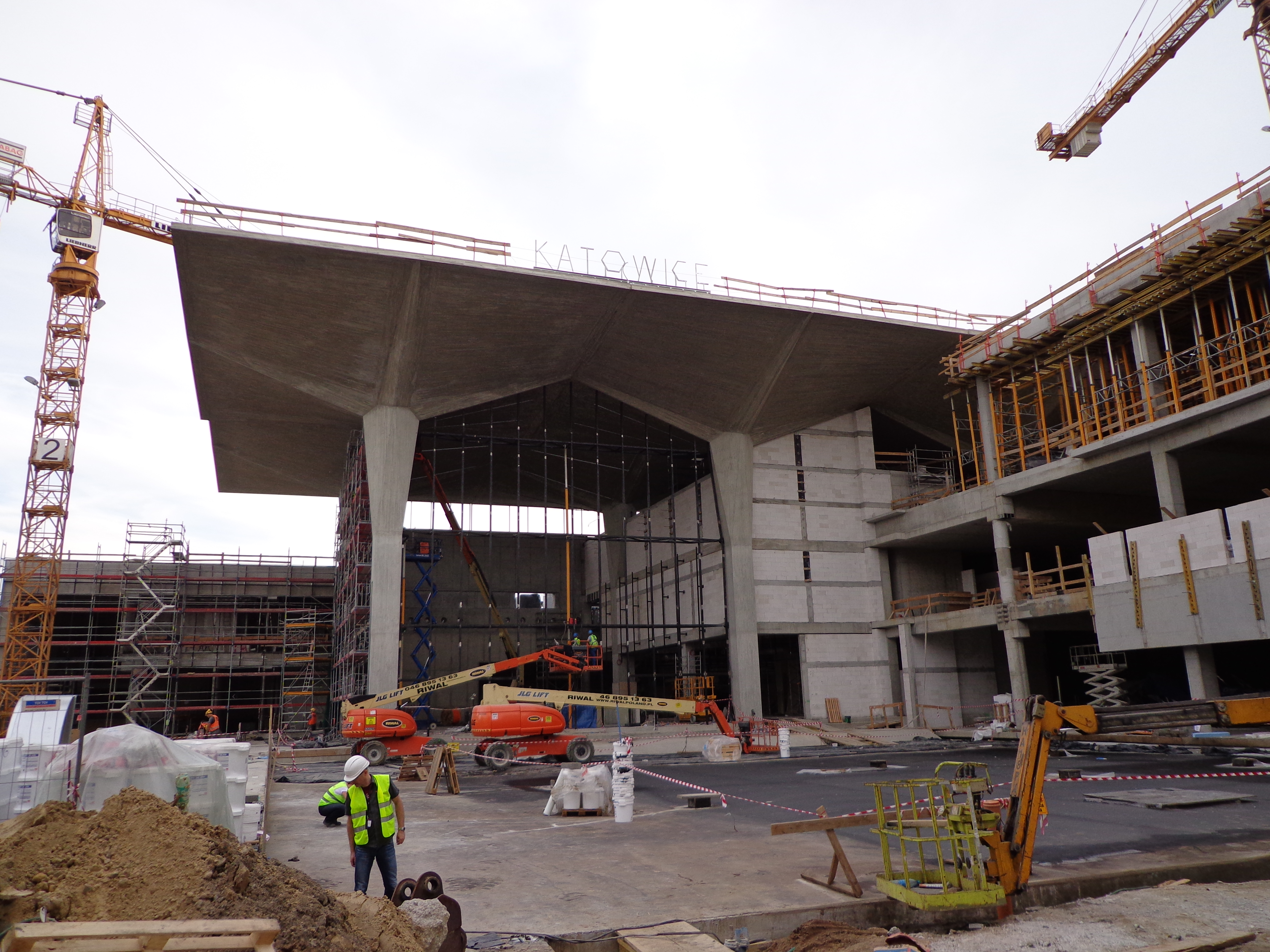 Widok na przyszłe główne wejście do hali dworca głównego w Katowicach